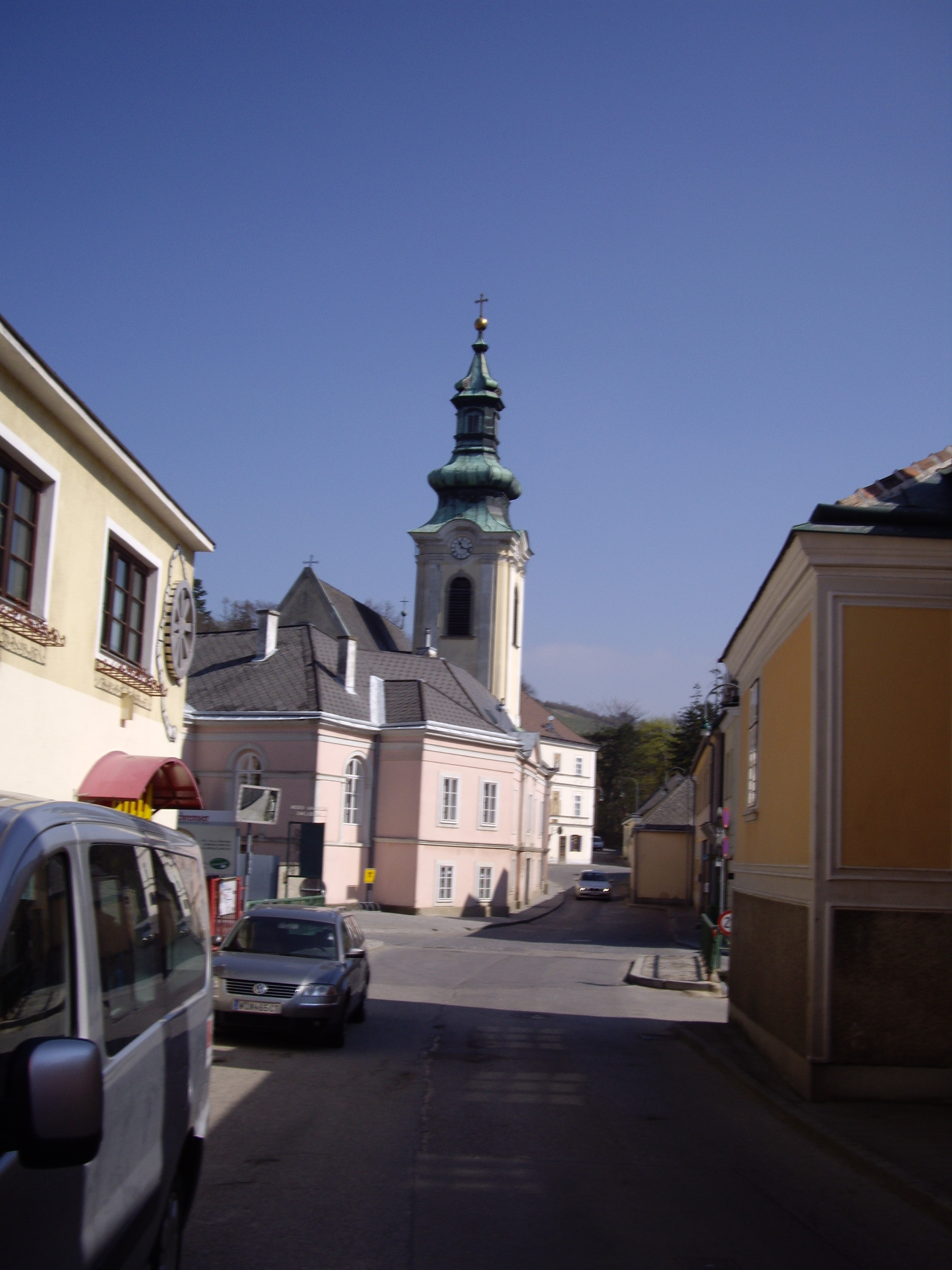 Katolika preghejo en Weidling en la direkto al Klosterneuburg.